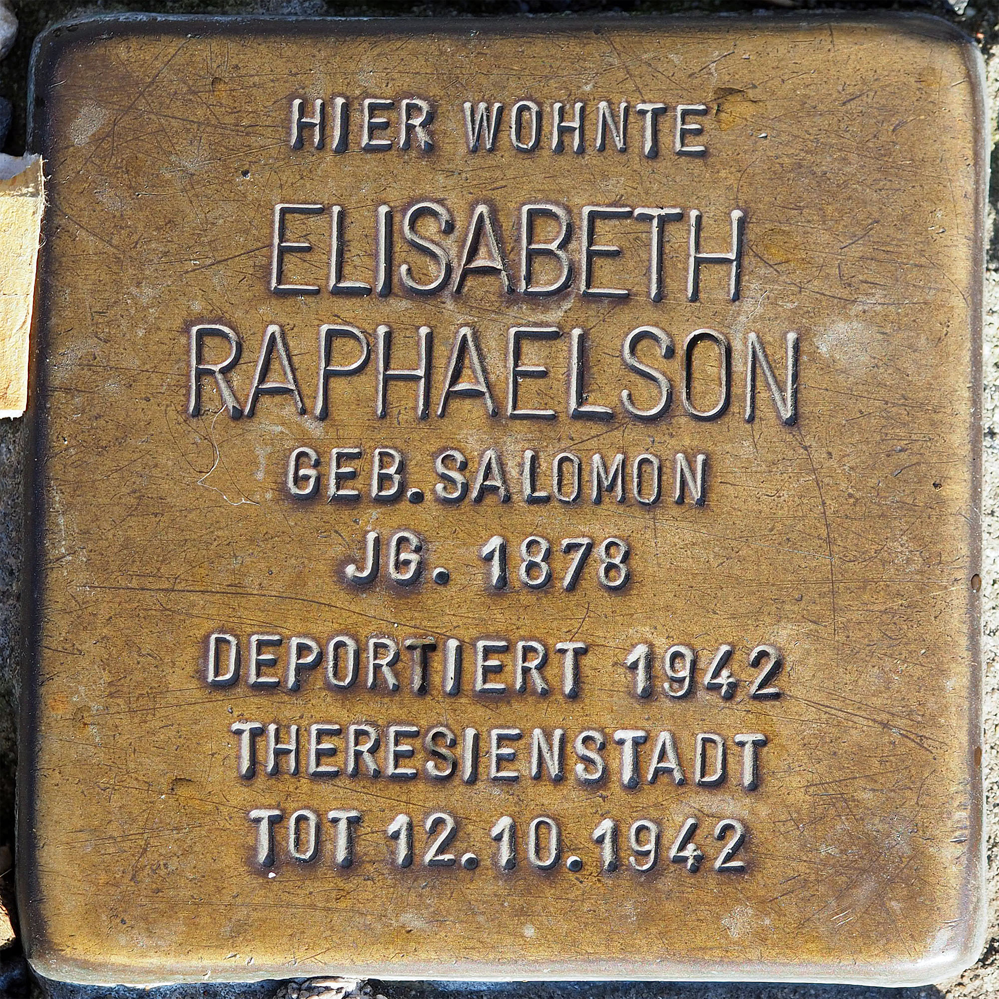 Stolpersteine MG: Raphaelson, Elisabeth